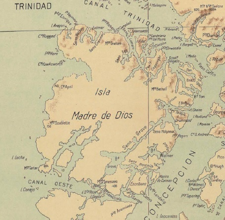 La imagen es un detalle del “Atlas Centenario”, desarrollado por la Oficina de Mensura de Tierras del Gobierno de Chile dirigida por don Luis Risopatrón con ayuda de los cartógrafos Nicanor Boloña y Luis Ossandón. Esta obra fue desarrollada por orden del Presidente de la República don Pedro Montt y publicada en el año del centenario de la república en 1910.